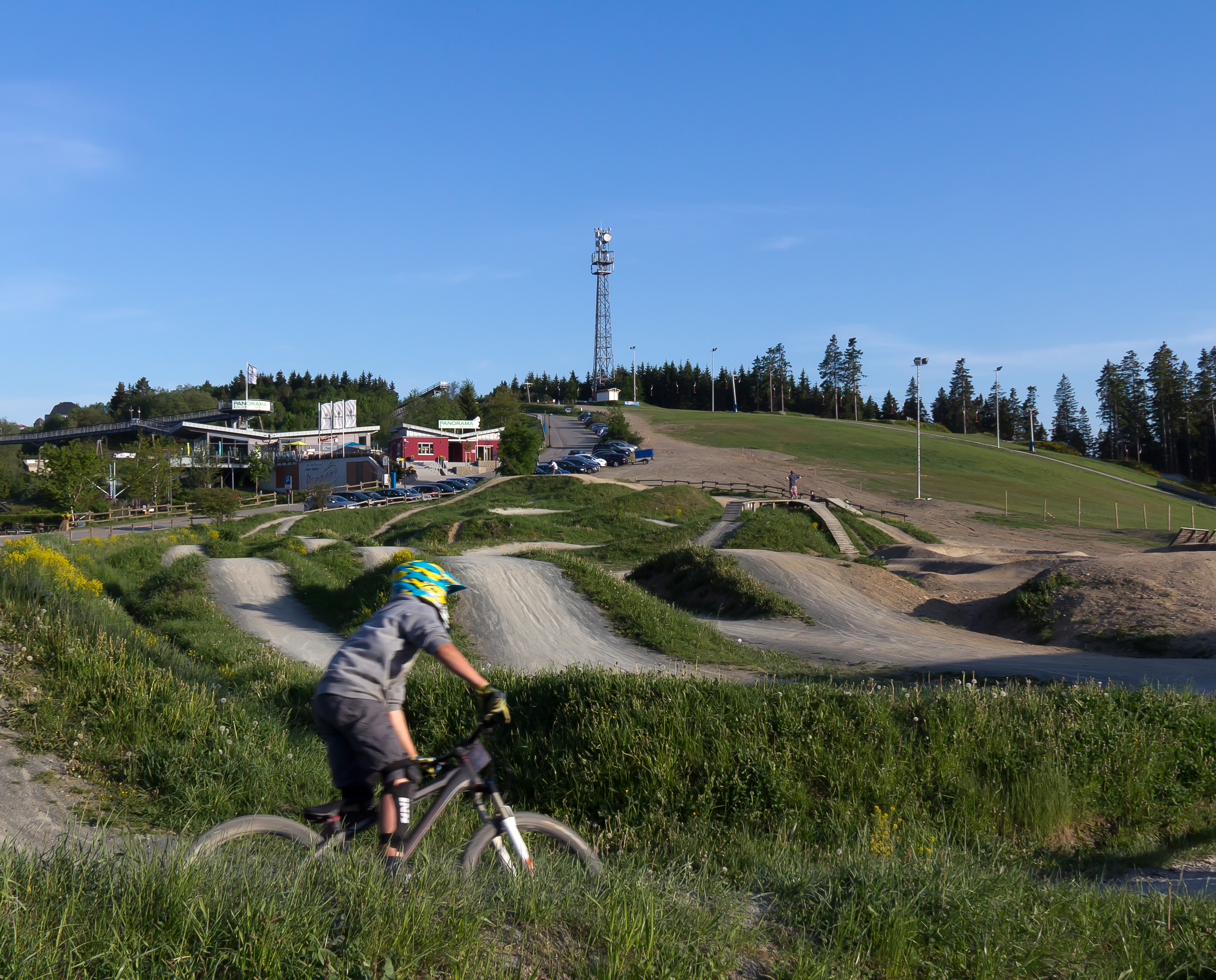 Mountainbike-Übungsparcour des Bikepark Winterberg, im Hintergrund der Gipfel des Kappe